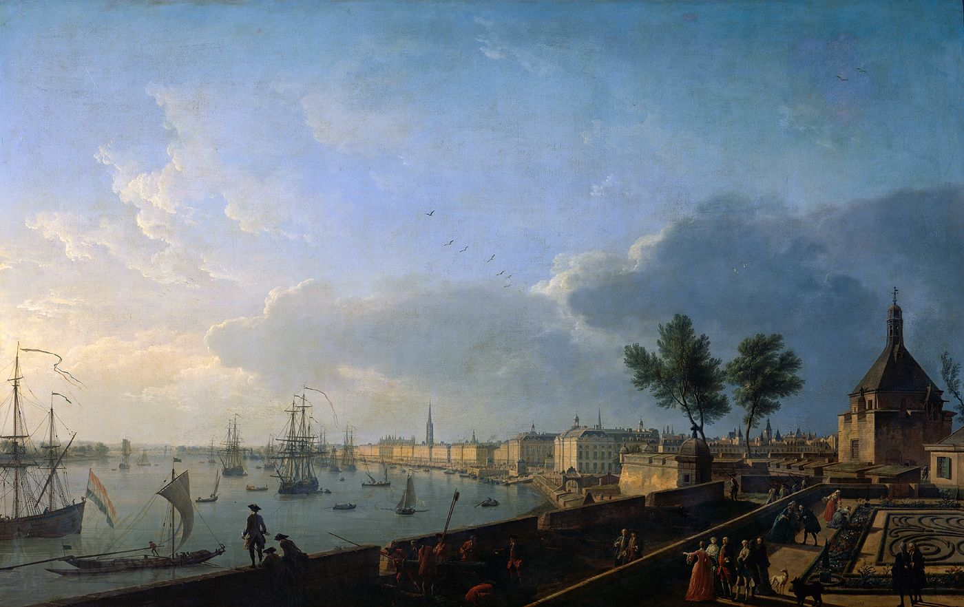 Tableau peint en 1759 par Claude-Joseph Vernet dans la série des Vues des ports de France. Musée national de la Marine, 165 X 263 cm.